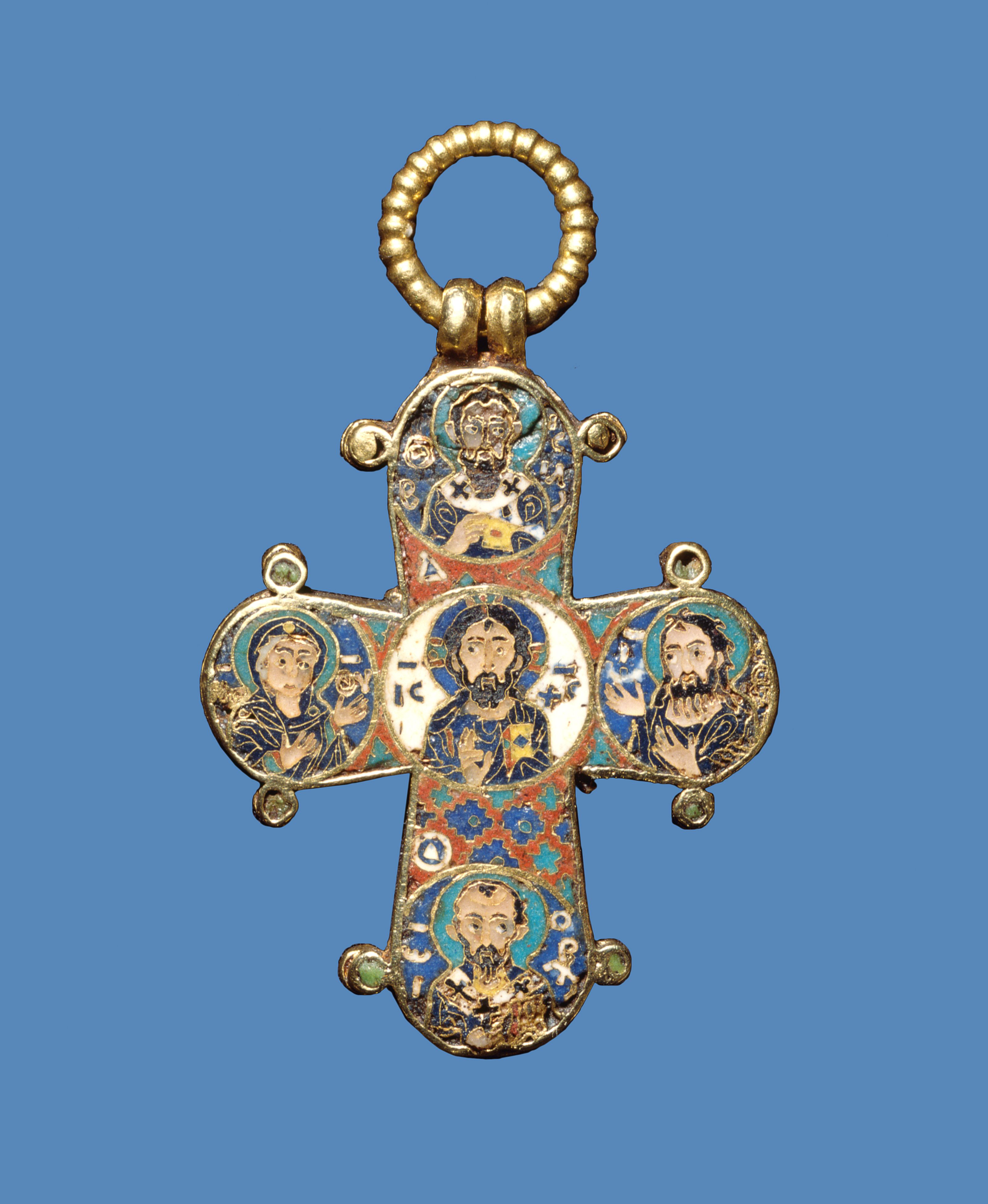 Byzantinsk relikviekors udført af guld med emalje i celle-emaljeteknik, fundet i en grav i Ringsted S. Bendts Kirke i 1600-tallet og indsendt til Det kongelige Kunstkammer, hvor man formodede, at det havde tilhørt Valdemar Sejrs dronning Dagmar. Korset kaldes derfor Dagmarkorset. Dateringen er omdiskuteret og spænder fra 1000-tallet til omkring 1200. En kopi af korset blev i 1863 givet af kong Frederik 7. som bryllupsgave til den danske princesse Alexandras bryllup med den engelske tronfølger Edward (7.). Siden er kopier af korset i sølv og guld blevet populære i Danmark til dåb og konfirmation. Datering: 1000-årene.